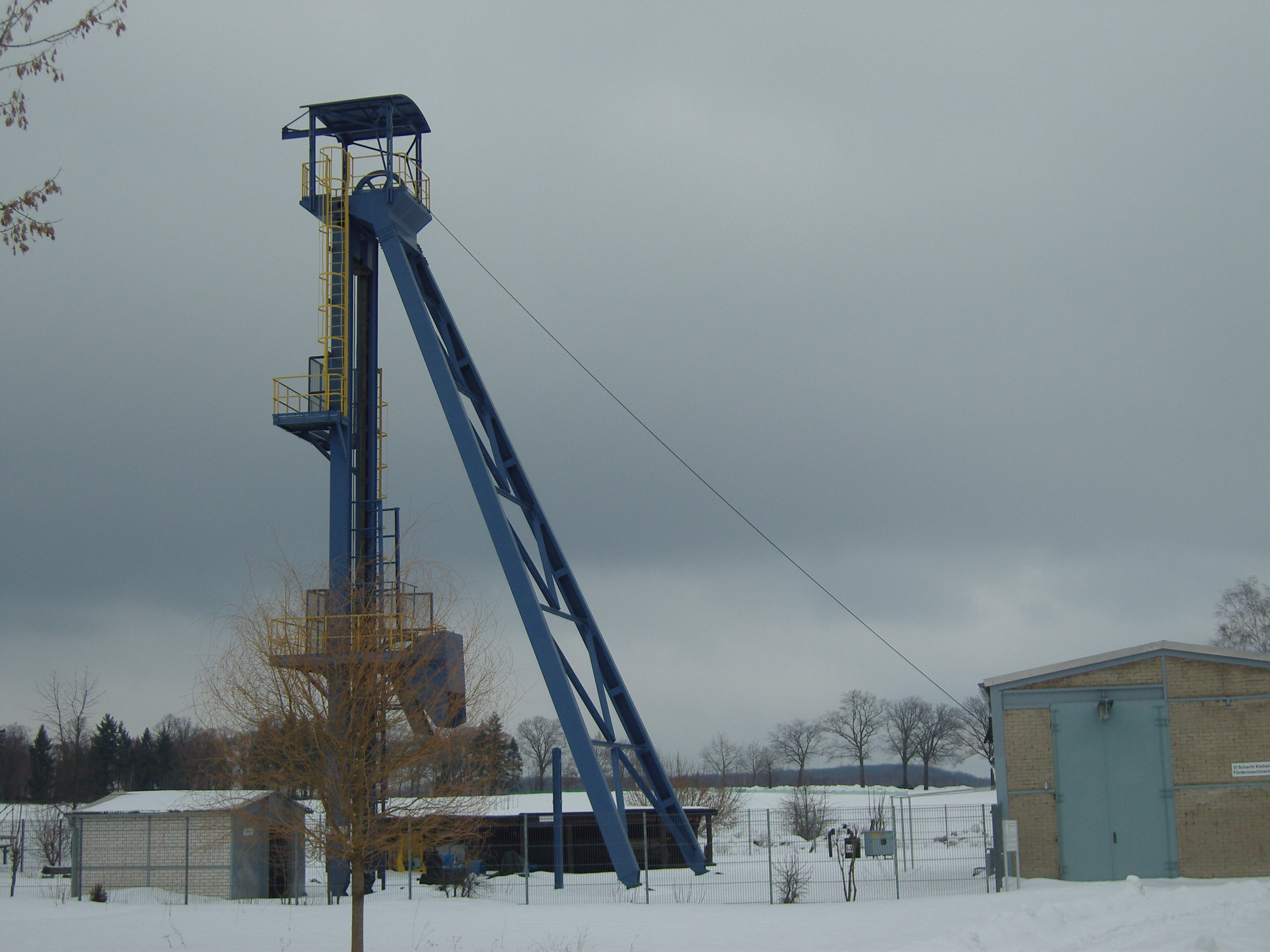 ehemaligen Schachtanlage in Klettwitz - Baudenkmal